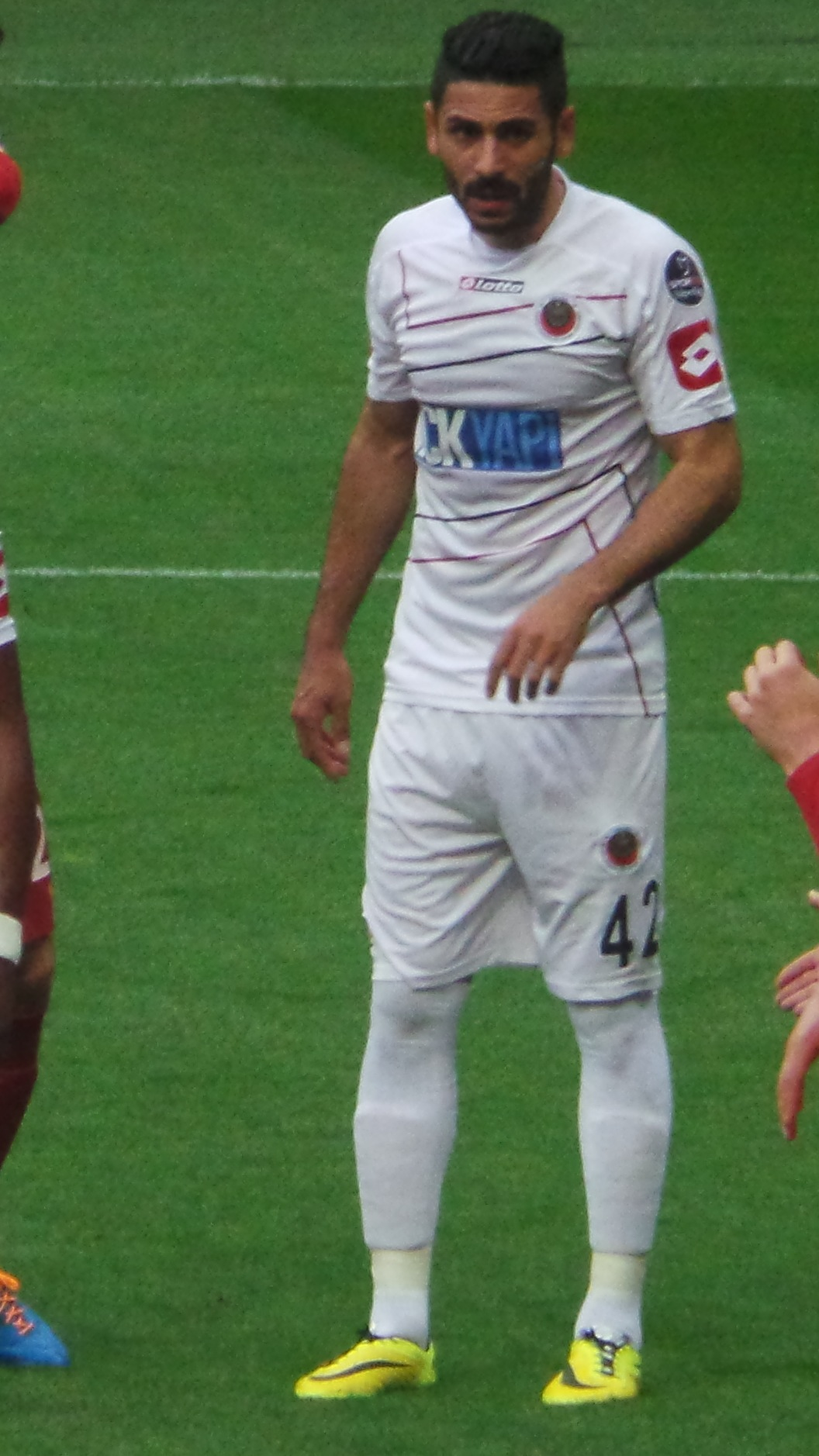 Hakan Aslantaş